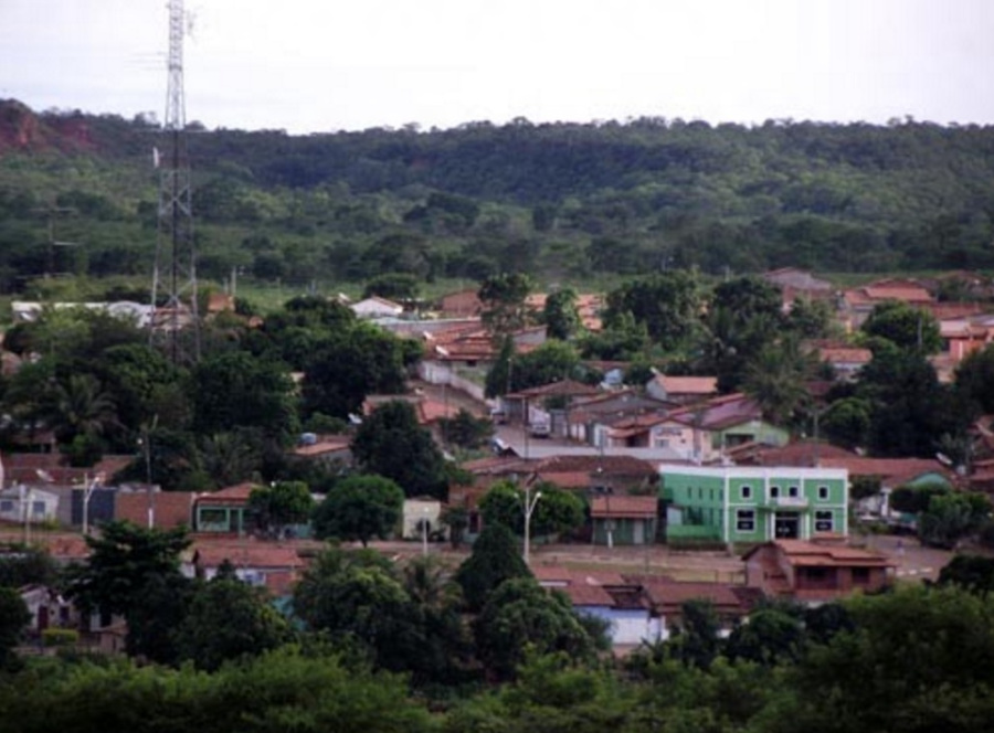 Vista panorâmica de Cristópolis